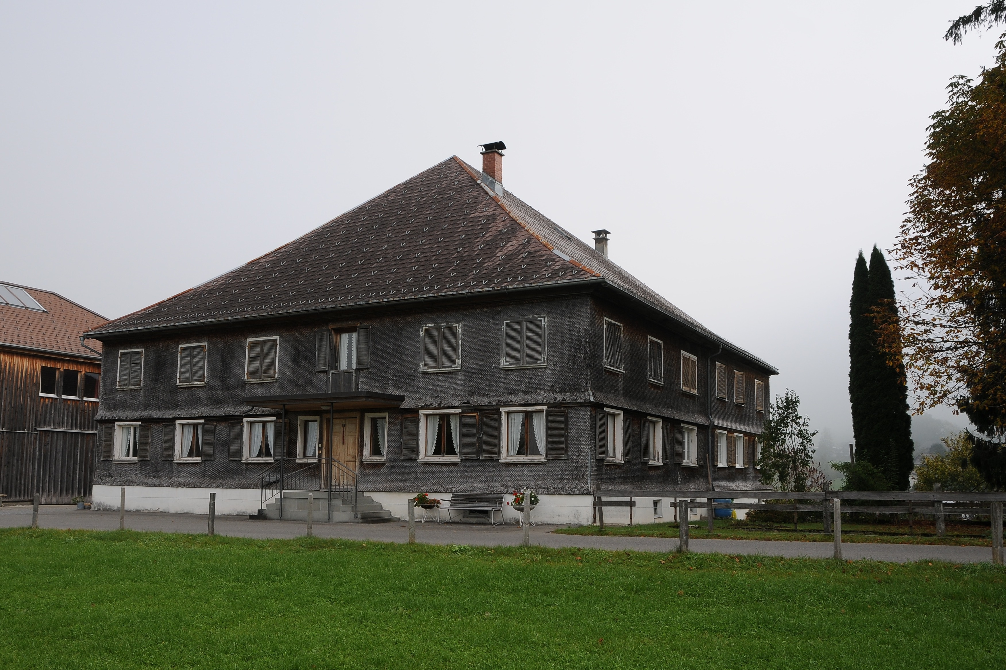 Wohnhaus, ehemalige Brauerei Geser in Hof Nr.153, Andelsbuch im Bregenzerwald. Das Objekt steht unter Denkmalschutz.